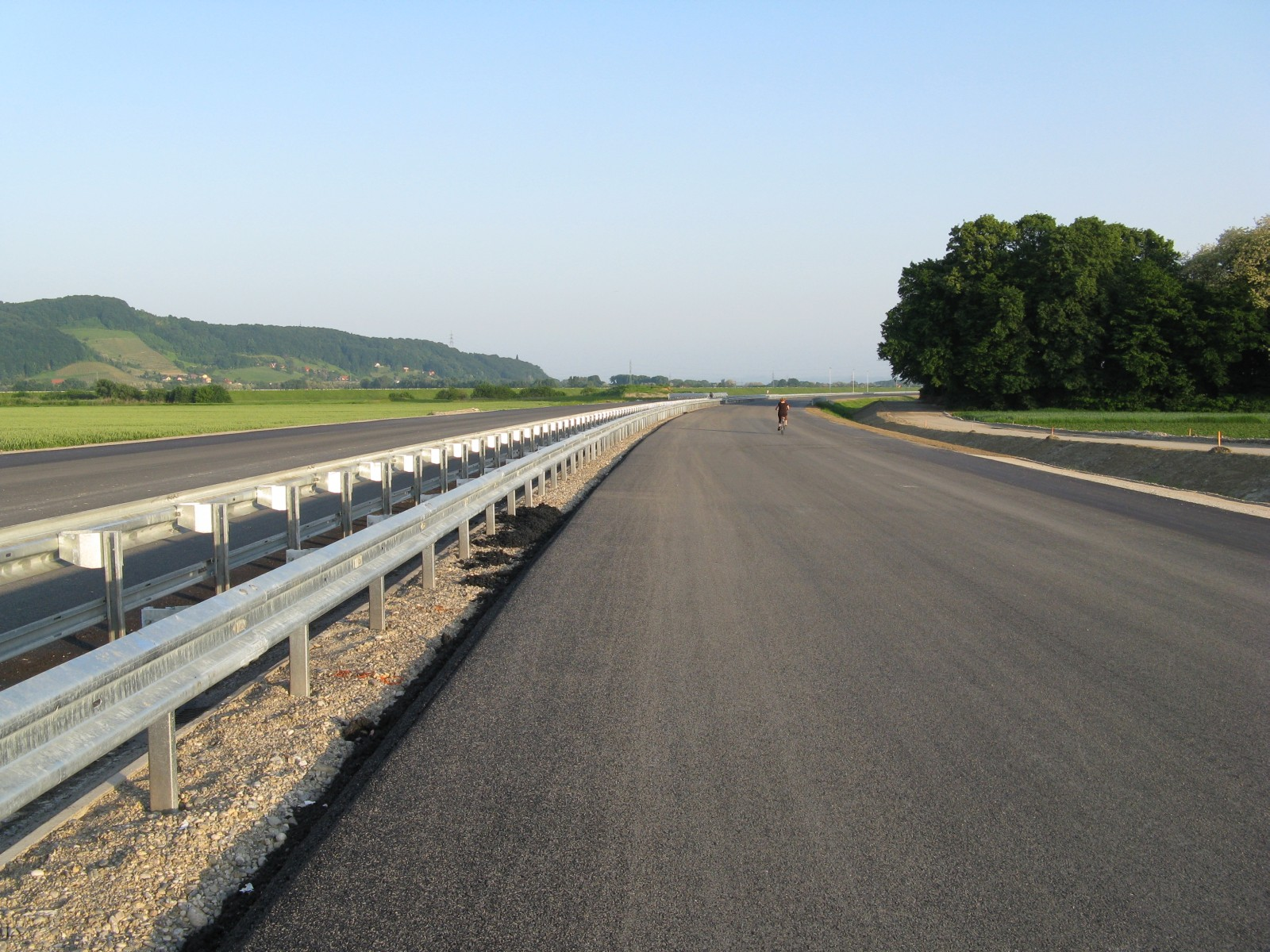 Nova avtocesta pri Zrkovcih